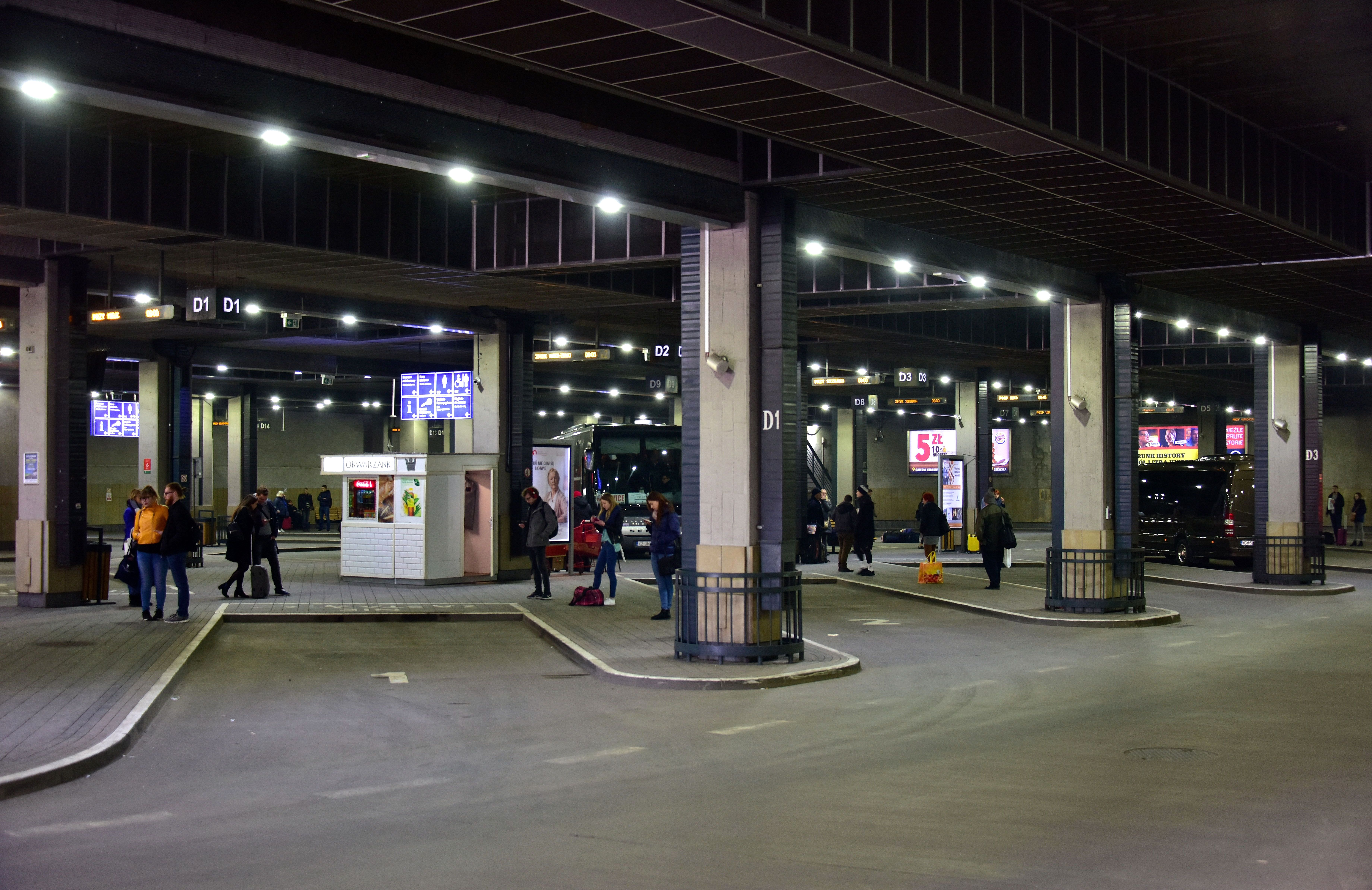 Dolny poziom dworca autobusowego MDA w Krakowie